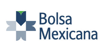 Logo BMV